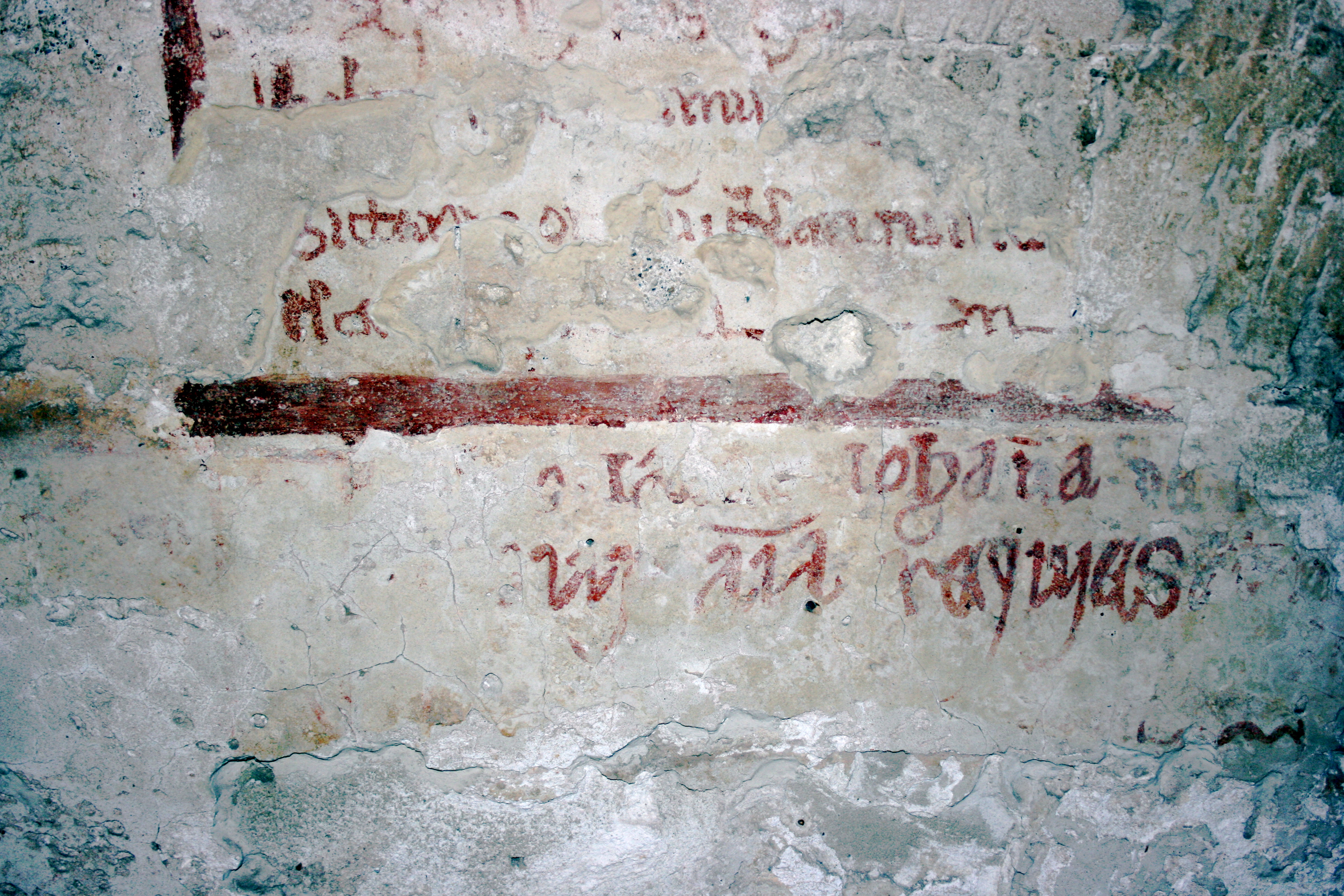 San Giovanni degli Eremiti (Palermo)